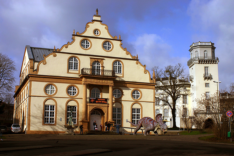 Das Ottoneum in Kassel ist als erstes feststehendes Theatergebäude Deutschlands errichtet worden und wird heute als Naturkundemuseum genutzt.